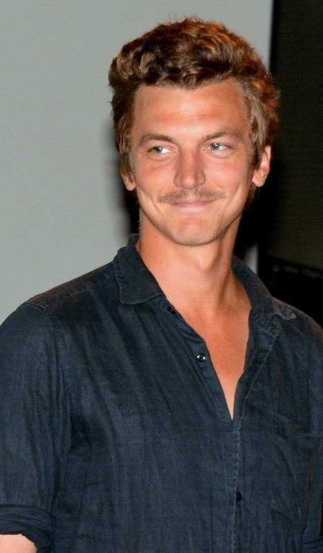 Olivier Chantreau à une avant-première du film "Moka"